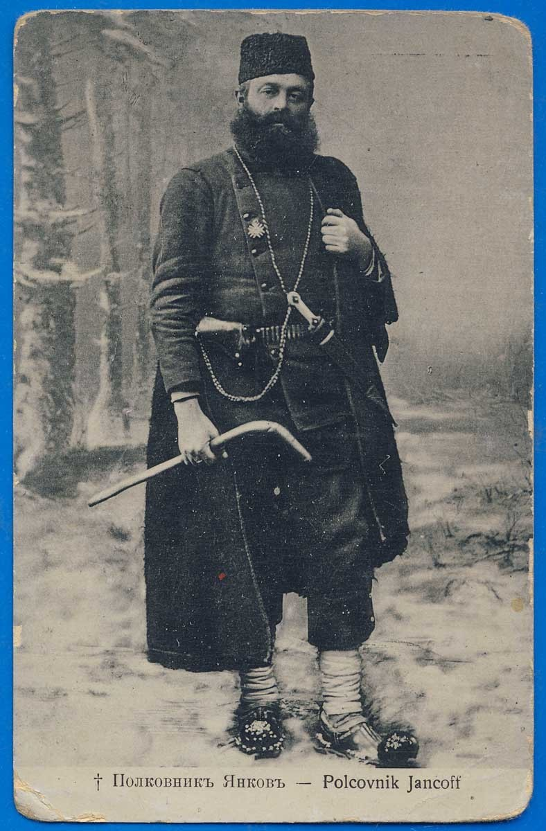 Полковник Анастас Янков